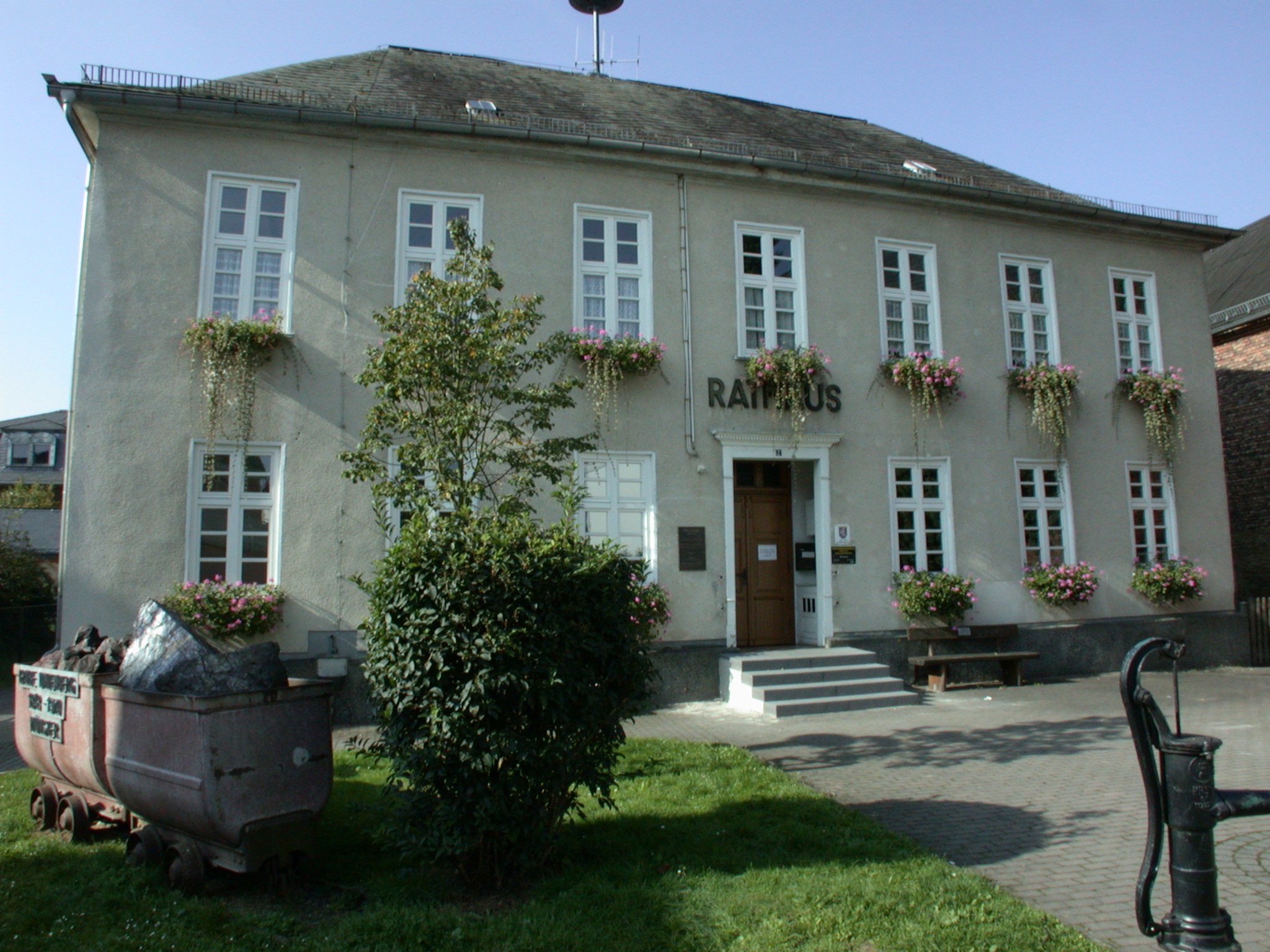 Altes Rathaus, alte Schule Selters-Münster